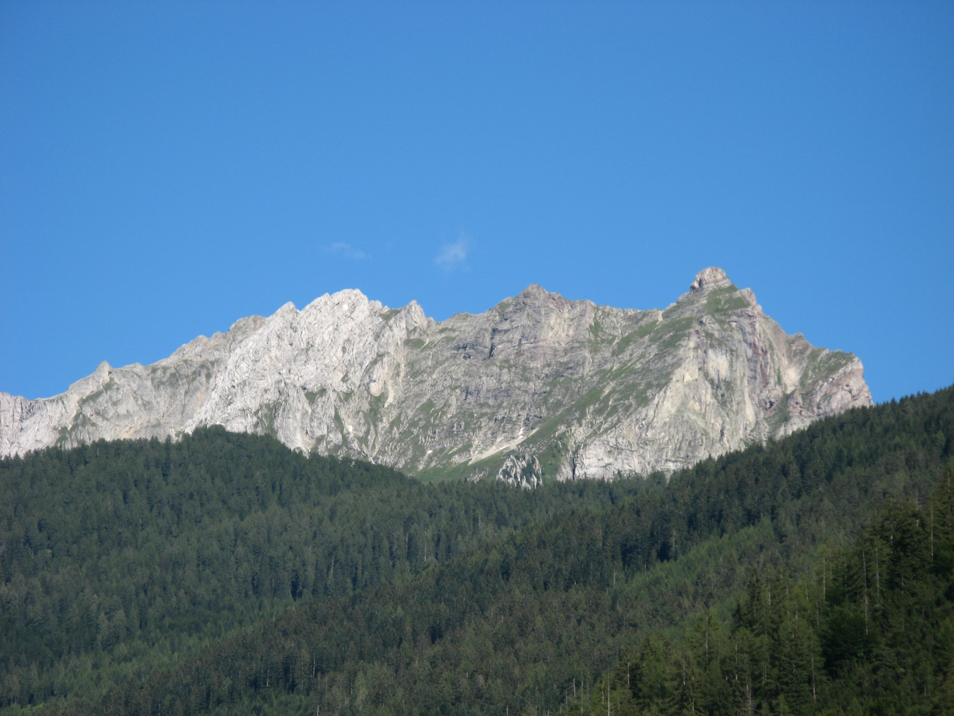 Vista del monte Talvena da La Valle, da K92.